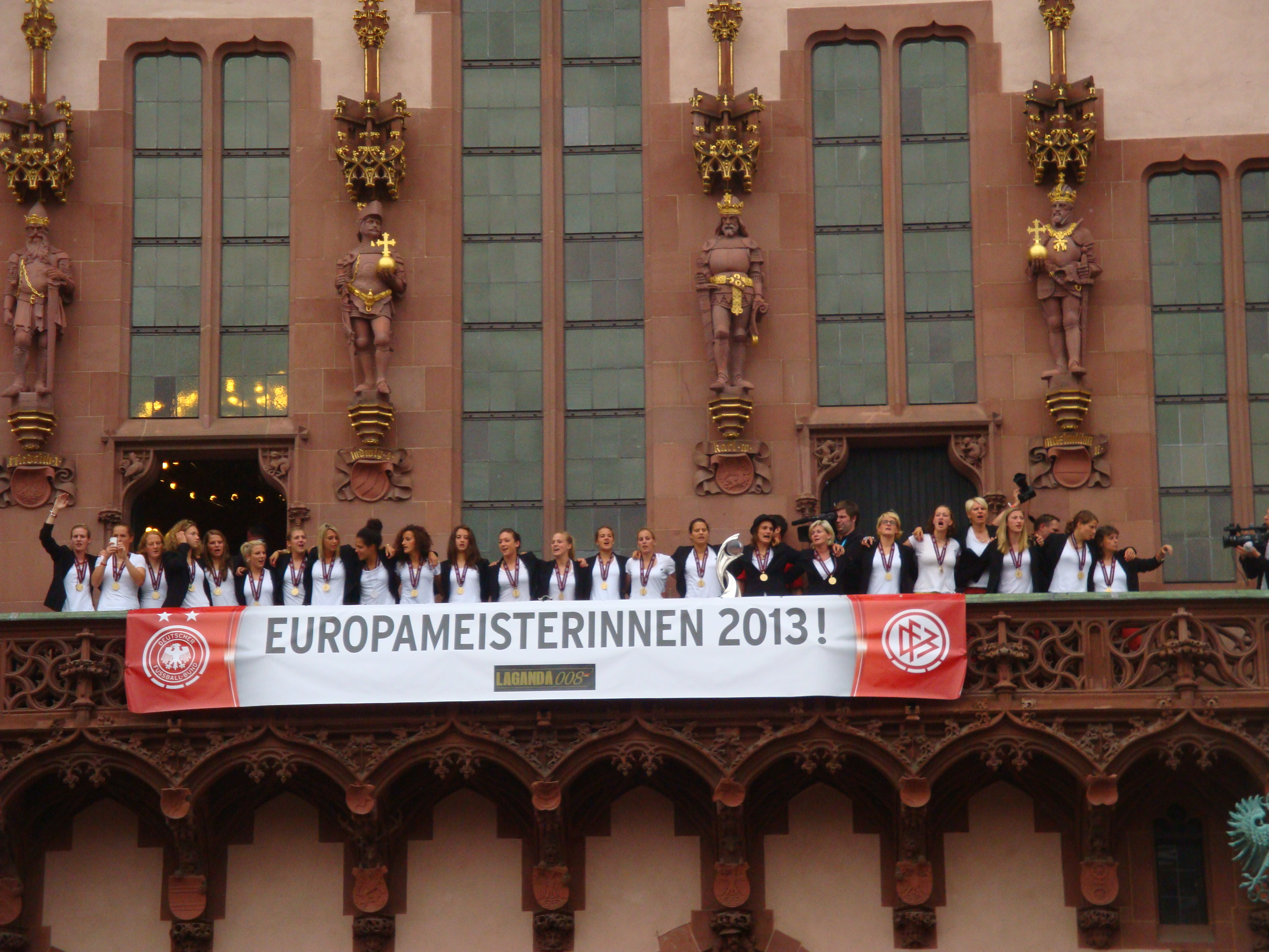 Feier in Frankfurt